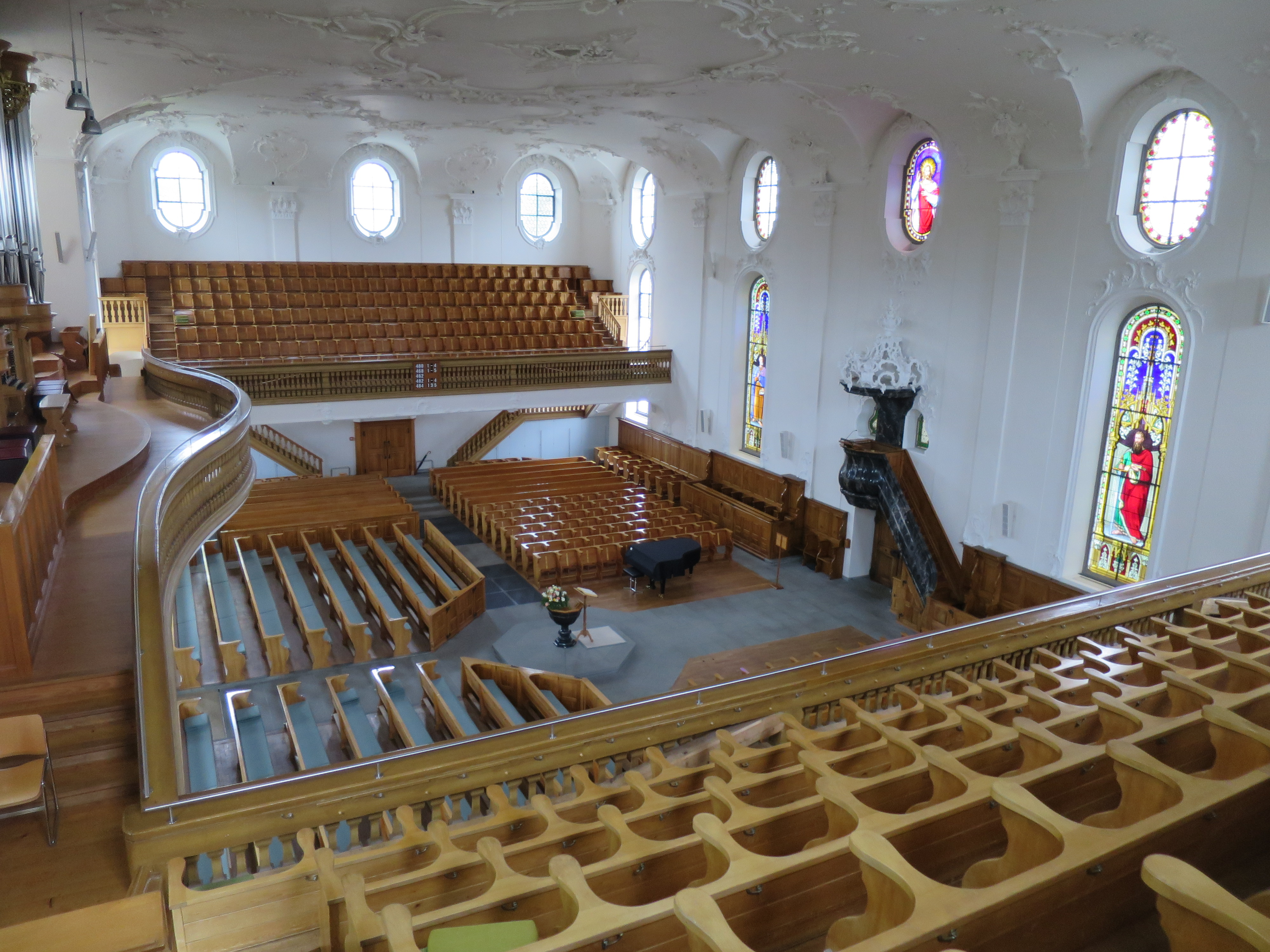 Reformierte Kirche Wädenswil - Innenraum